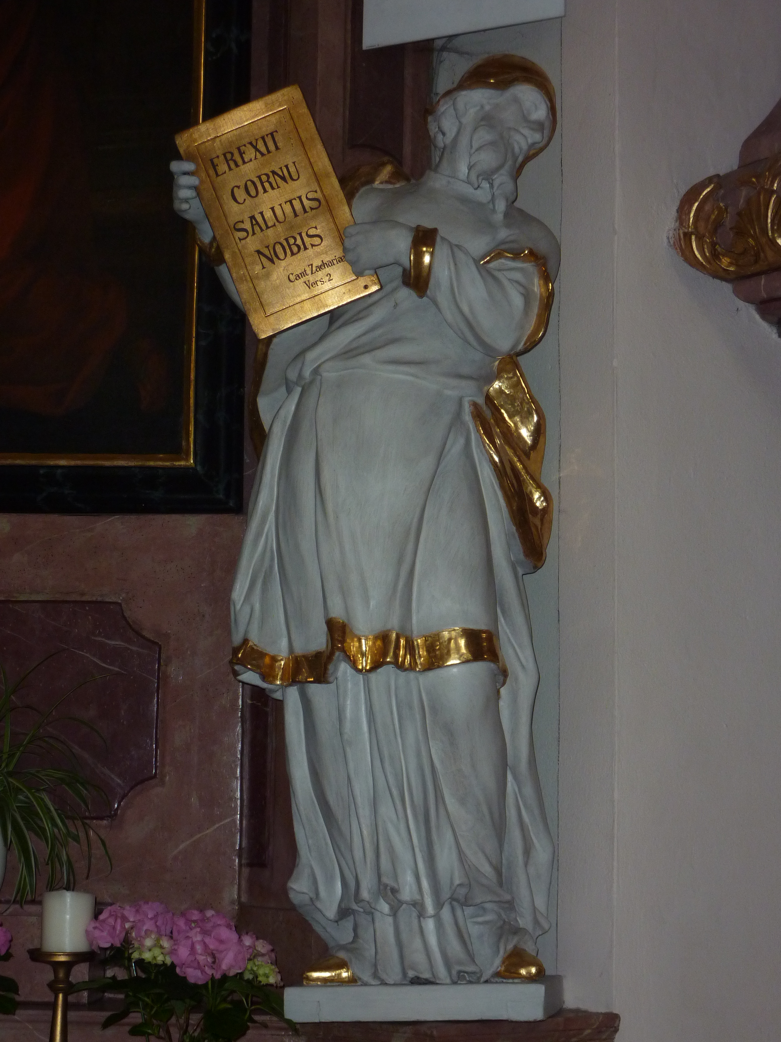 Pfarrkirche hll. Peter und Paul, Landsknechtplatz, Hadersdorf, Hadersdorf-Kammern, Niederösterreich - Statue hl. Zacharias am linken Seitenaltar (mit lat. Zitat aus dem Benedictus; Lk 1,69)